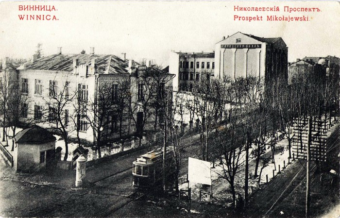 Миколаївський проспект у Вінниці. Не раніше 1913 р. (тоді проспект отримав назву Миколаївський)